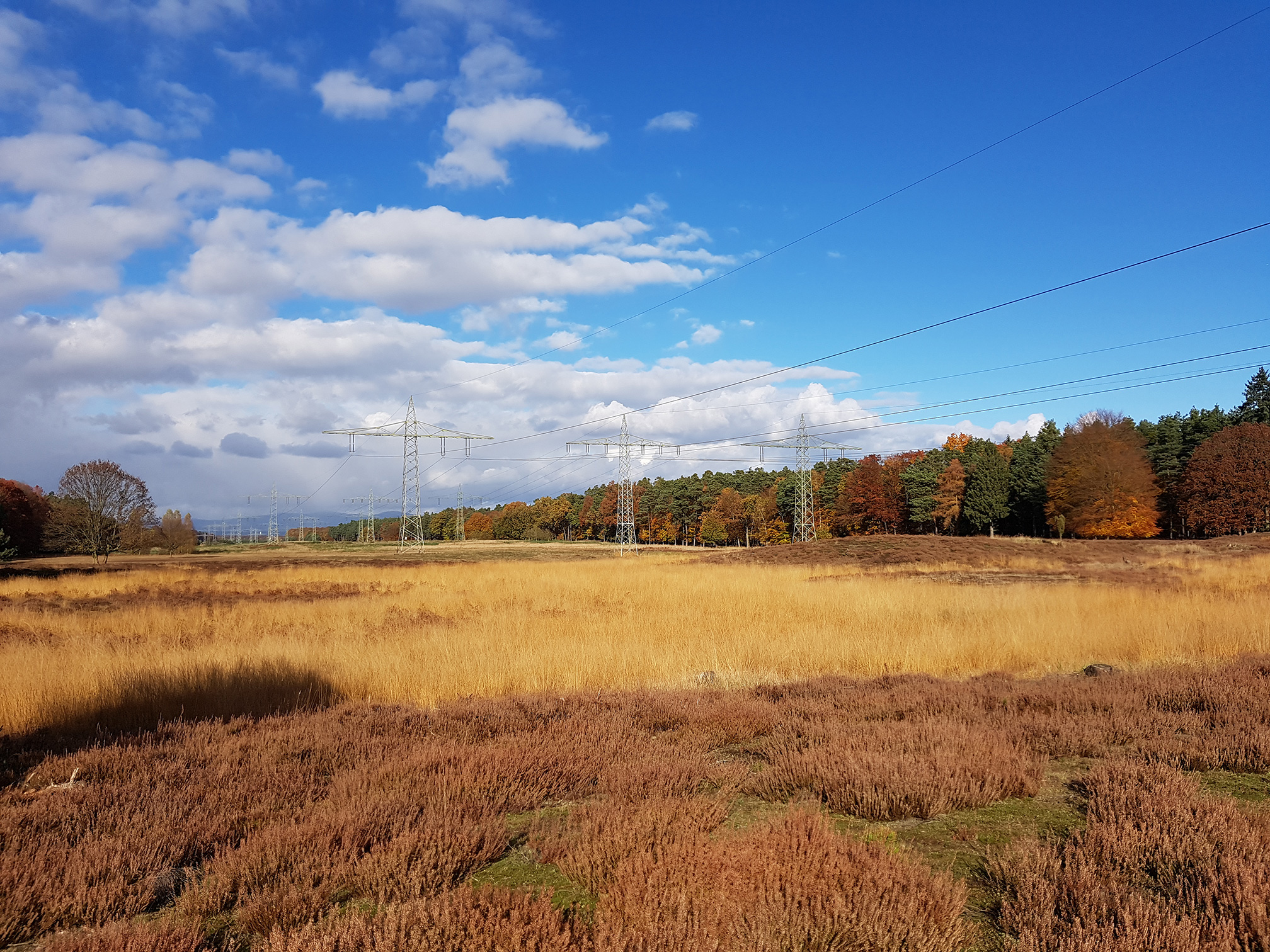 Schneise mit Heidelandschaft unter der Stromtrasse an der Startbahn West, Blickrichtung Norden auf den Taunus im FFH-Gebiet 5917-302 Heidelandschaft westlich Mörfelden-Walldorf mit angrenzenden Flächen im Kreis Groß-Gerau